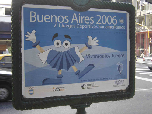 Cartel publicitario de los Juegos Suramericanos Buenos Aires 2006, ubicado en las calles de Buenos Aires.